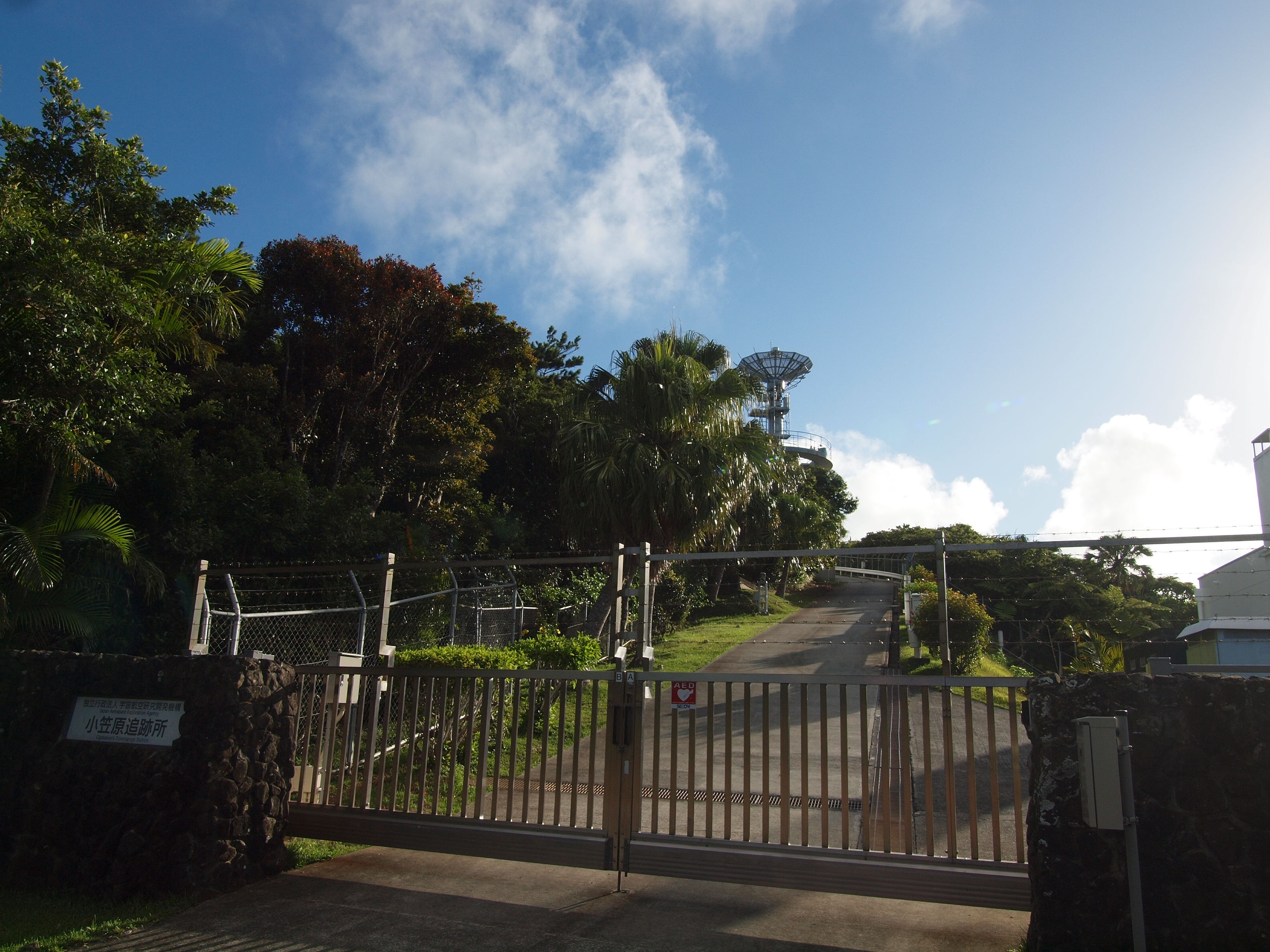 父島気象観測所